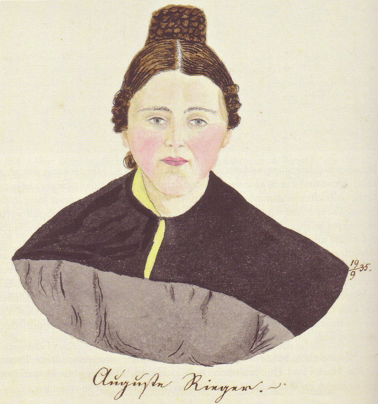 Porträtaquarell der Königsbergerin Auguste Rieger